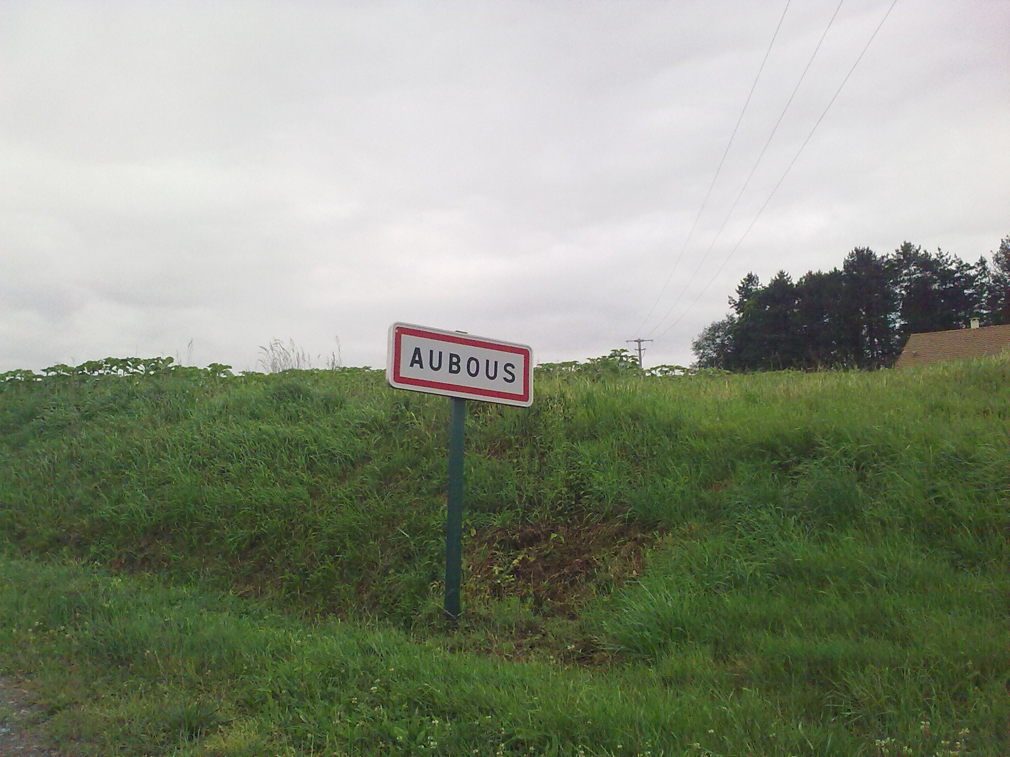 Aubous